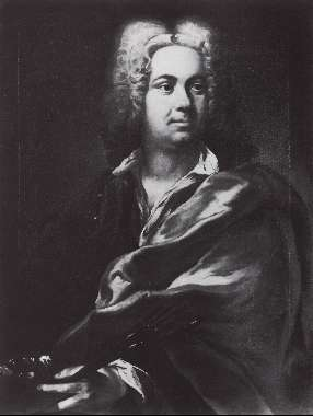 Daniel Gran, Autoportrét, z knihy: E. Knab, Daniel Gran. Wien - München 1977.